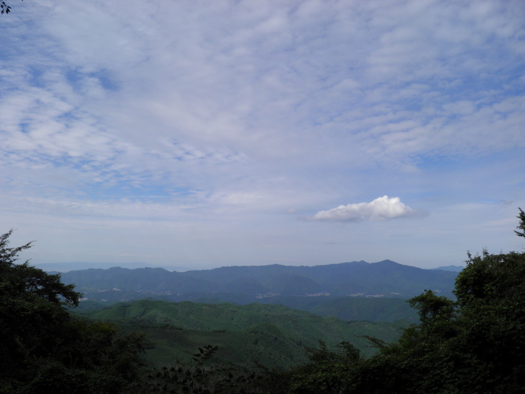 竜門山地を青根ヶ峰付近より撮る